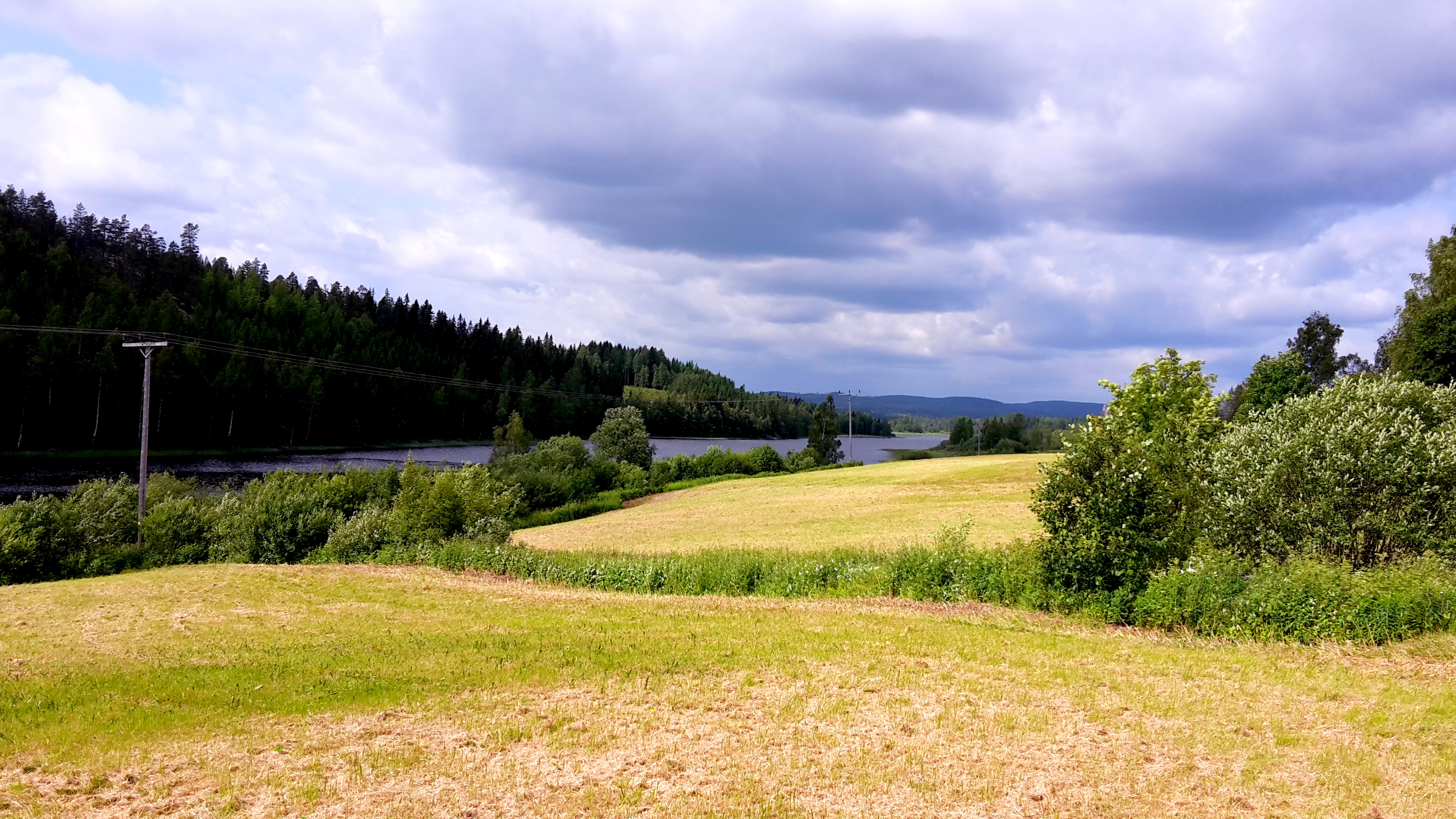 Nyåkerssjön i vy från öster.